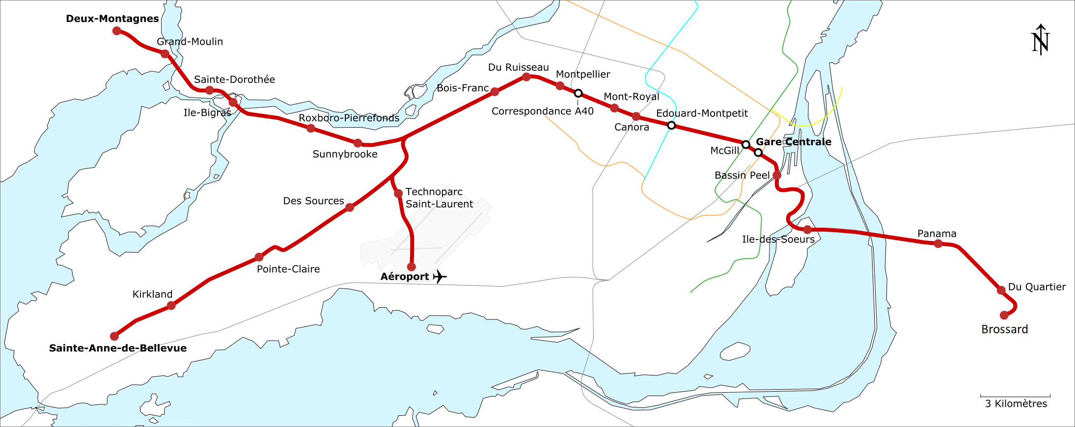 Carte géographiquement exacte du réseau express métropolitain proposé.